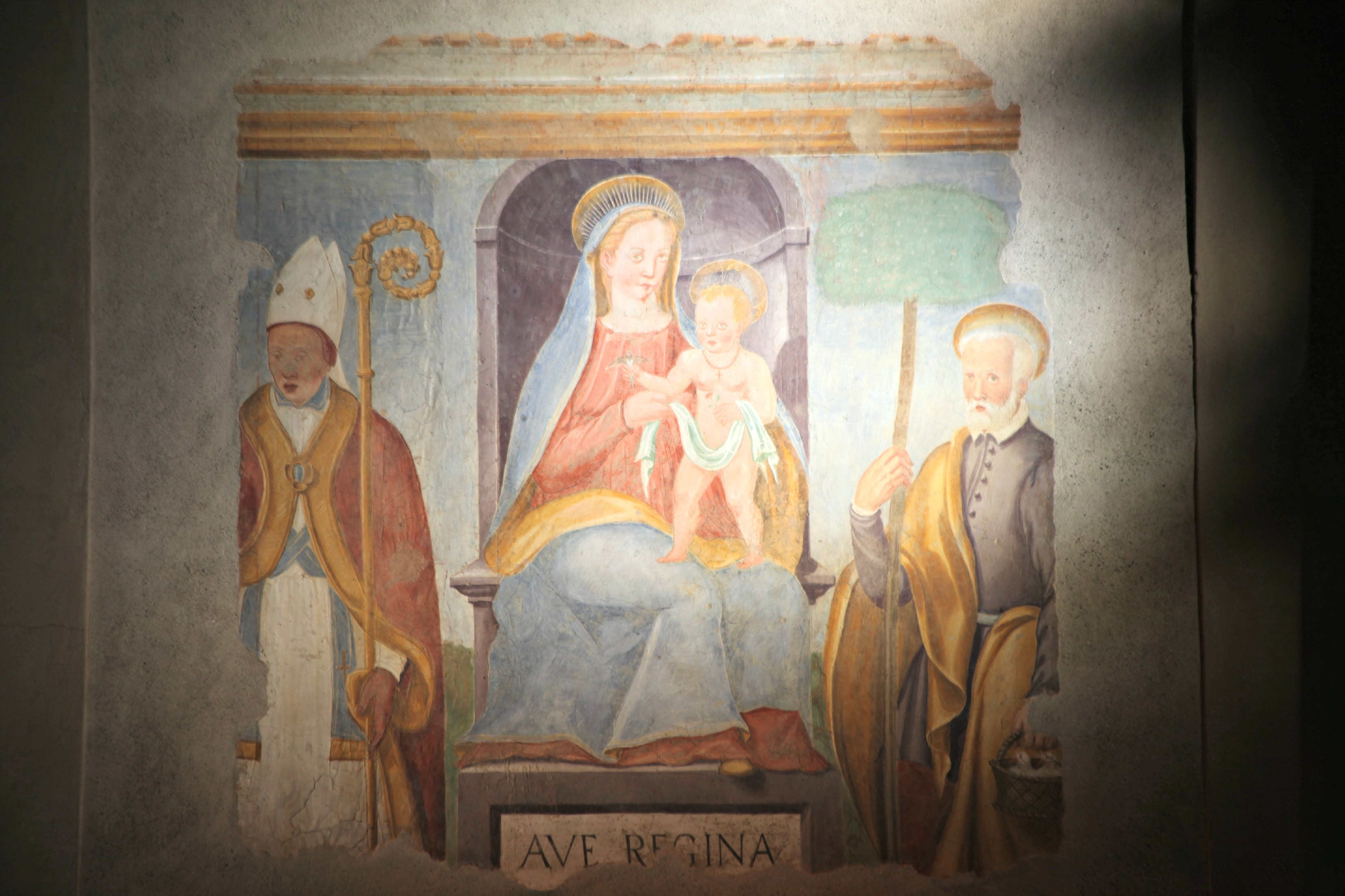 Madonna col Bambino in trono e Santi (Altar maggiore della Chiesa della Madonna del Carmine, Peccioli)